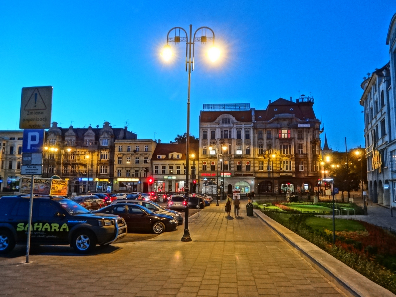 Plac Teatralny w Bydgoszczy